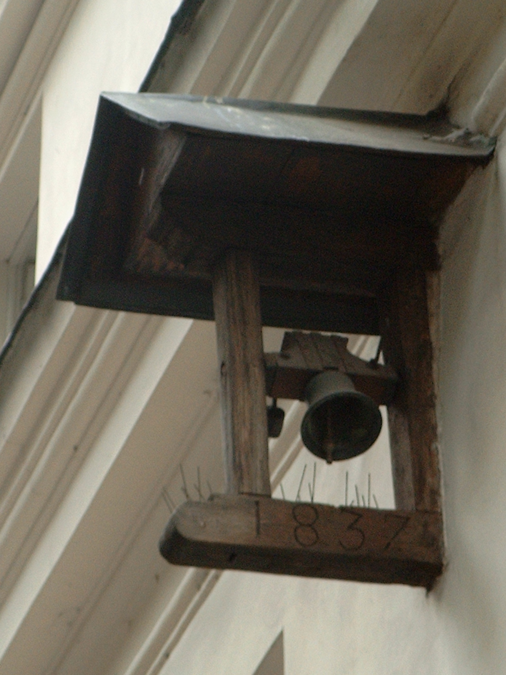 "Dzwonek za konających" przy kościele Reformatów św. Kazimierza Królewicza w Krakowie